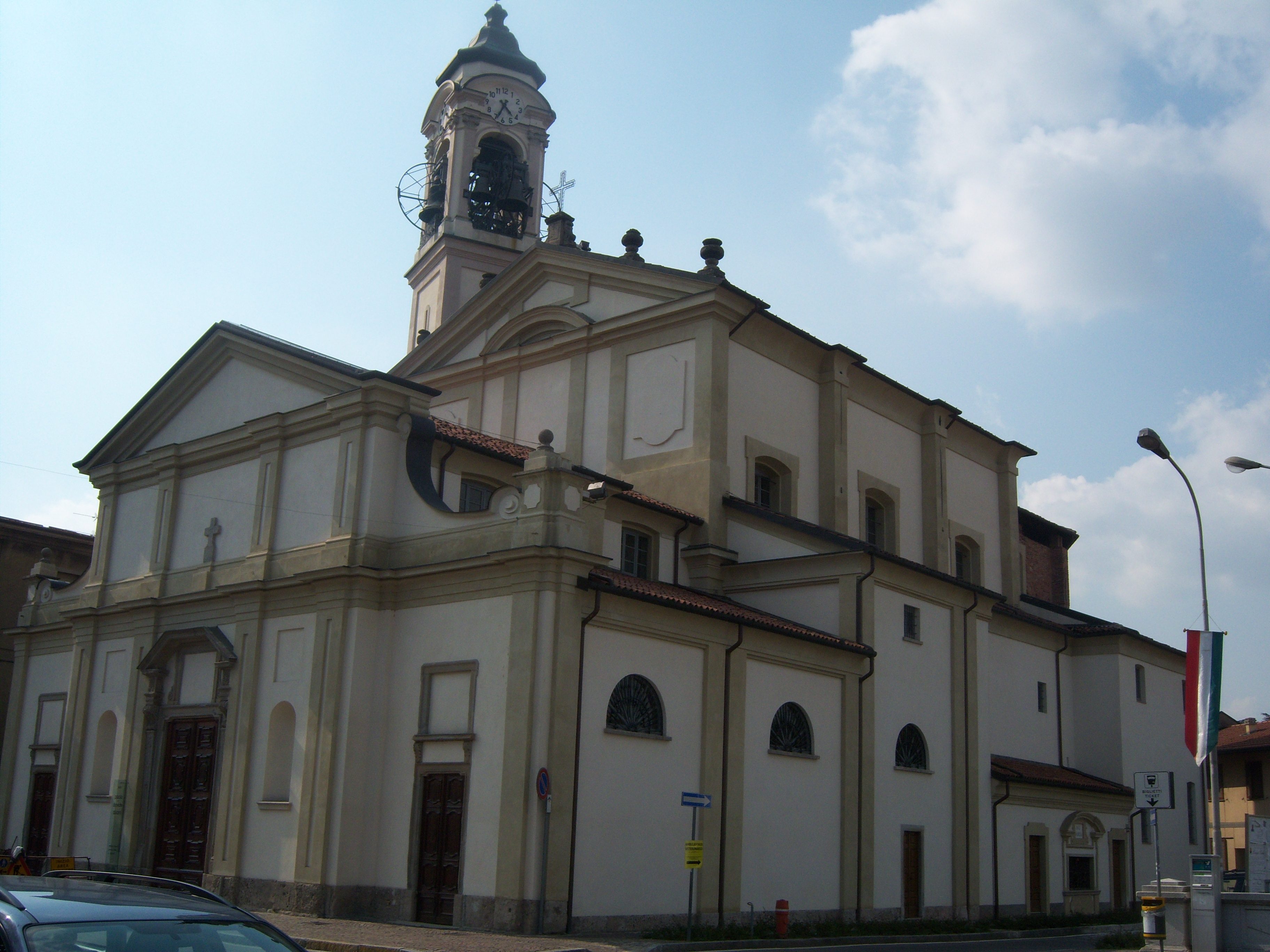 Antica Chiesa di Cesano Maderno